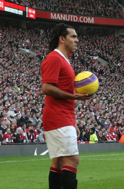 Carlos Tévez